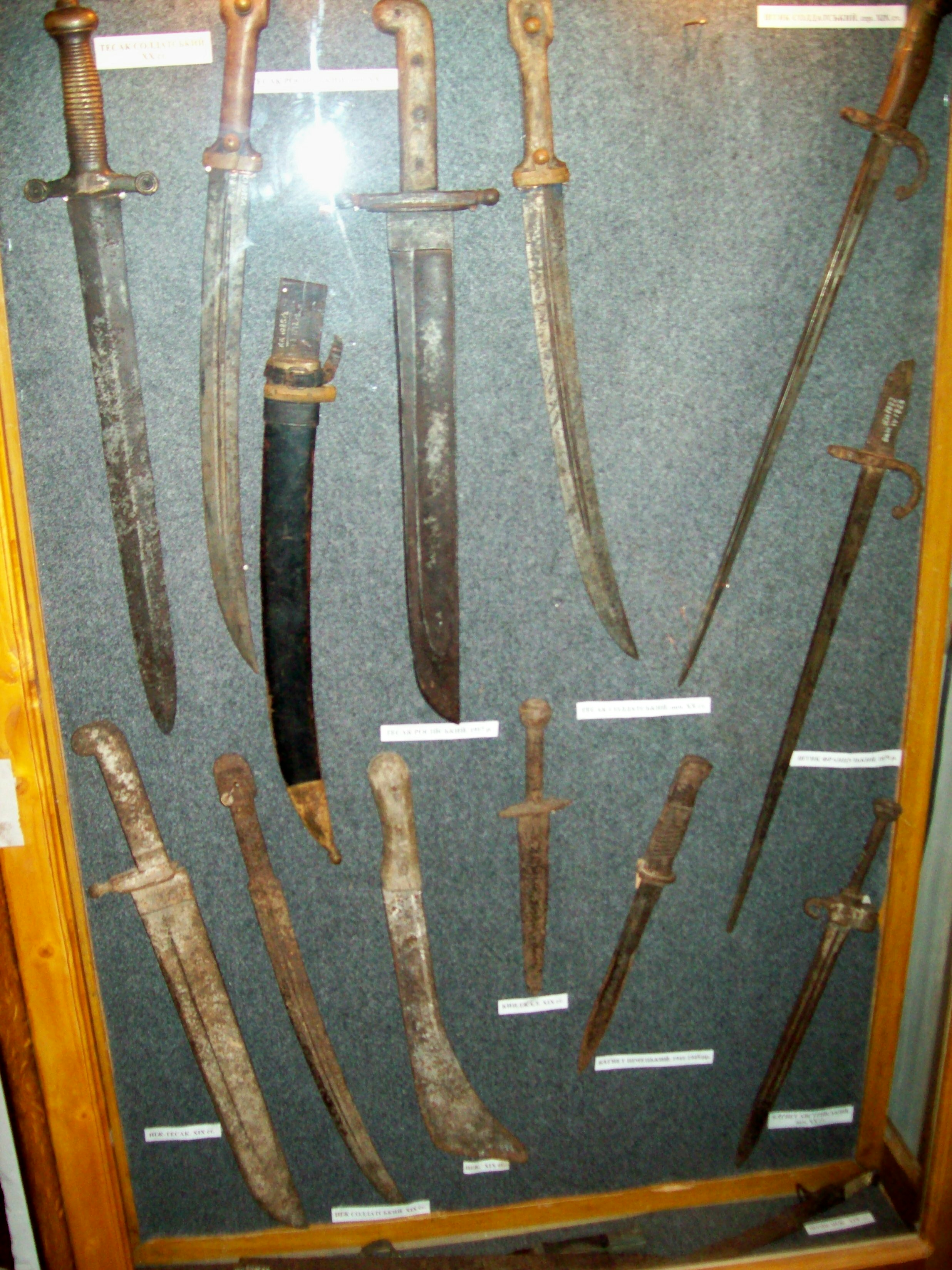 Знято фотоапаратом Kodak